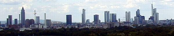 fotografed by Flups, GNU FDL Image:Frankfurt-main-skyline.jpg